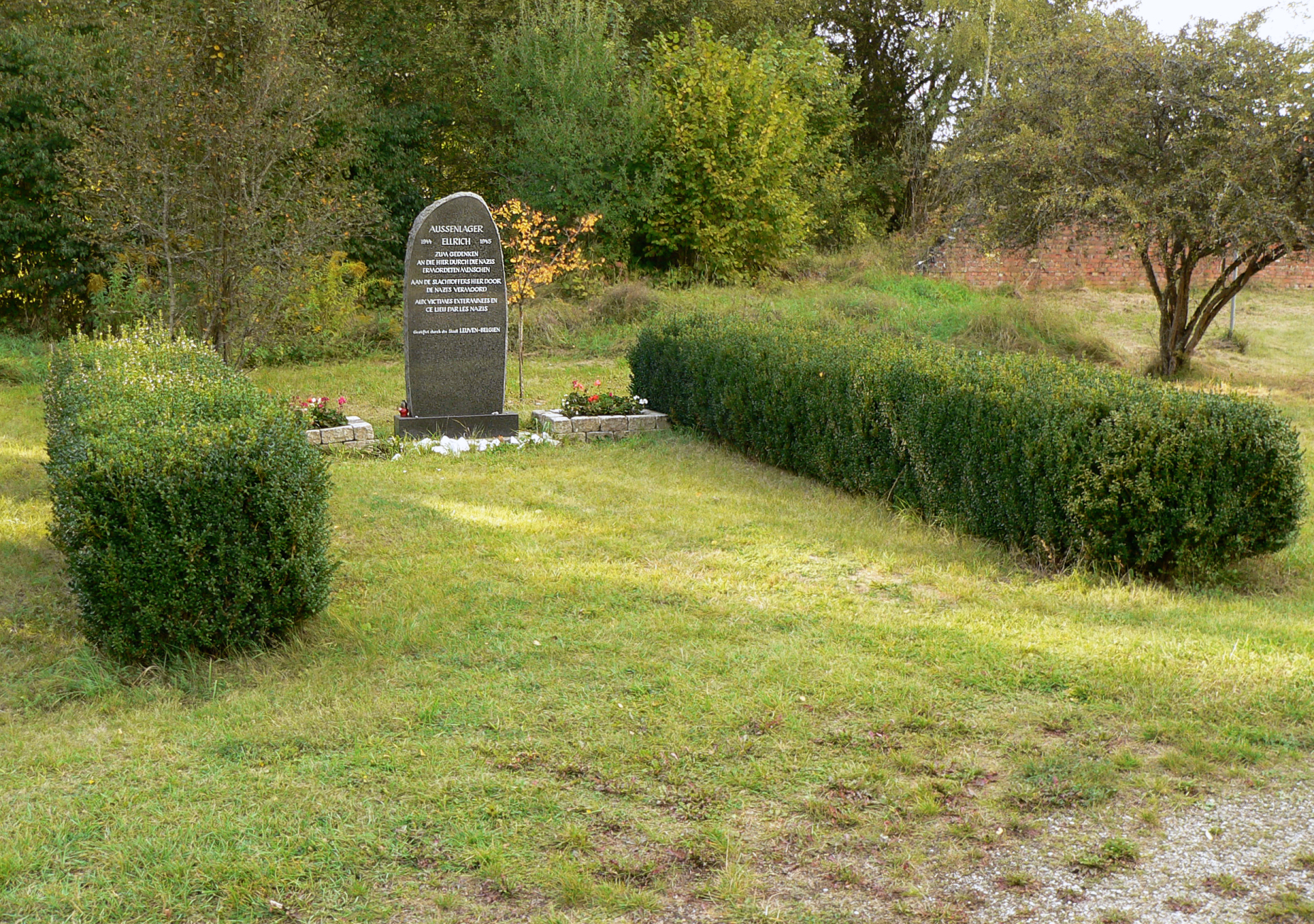 KZ-Außenlager Ellrich-Juliushütte, Gedenkstein auf dem früheren Appellplatz